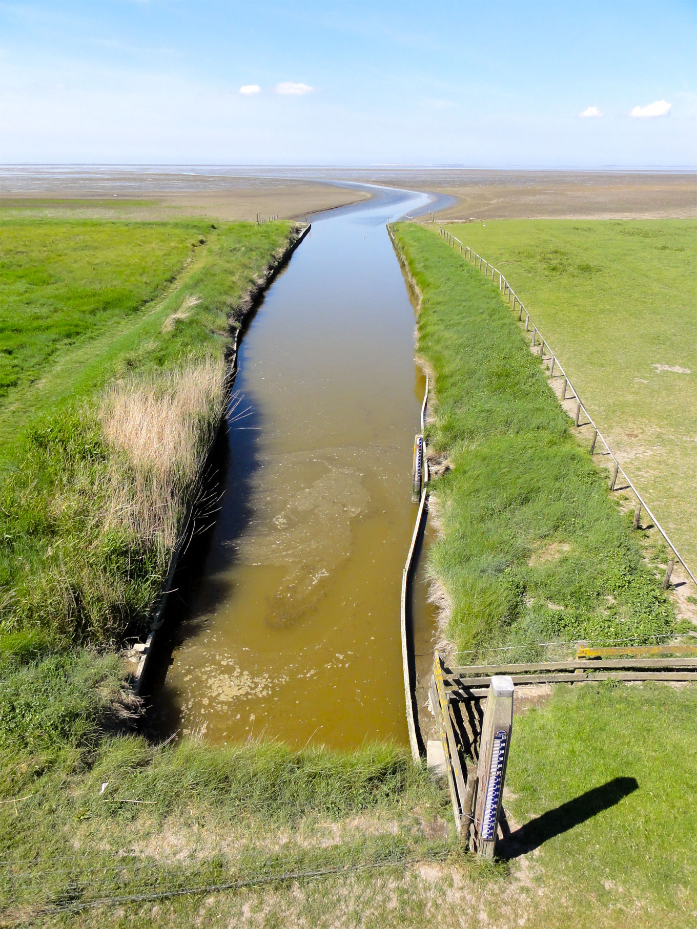 Uitwatering van Het Bildt in de Waddenzee bij het H.G. Miedemagemaal, Zwarte Haan, Friesland